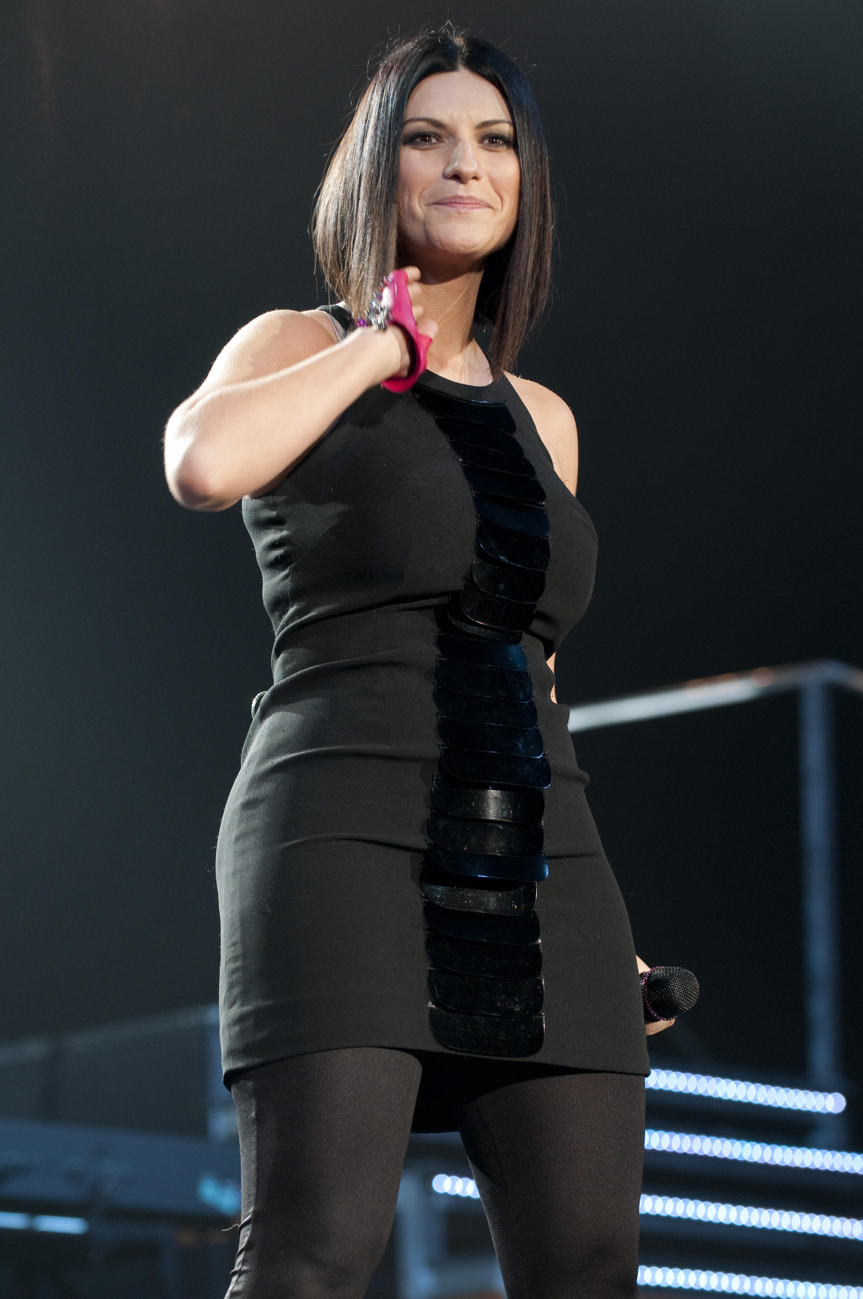 Laura Pausini